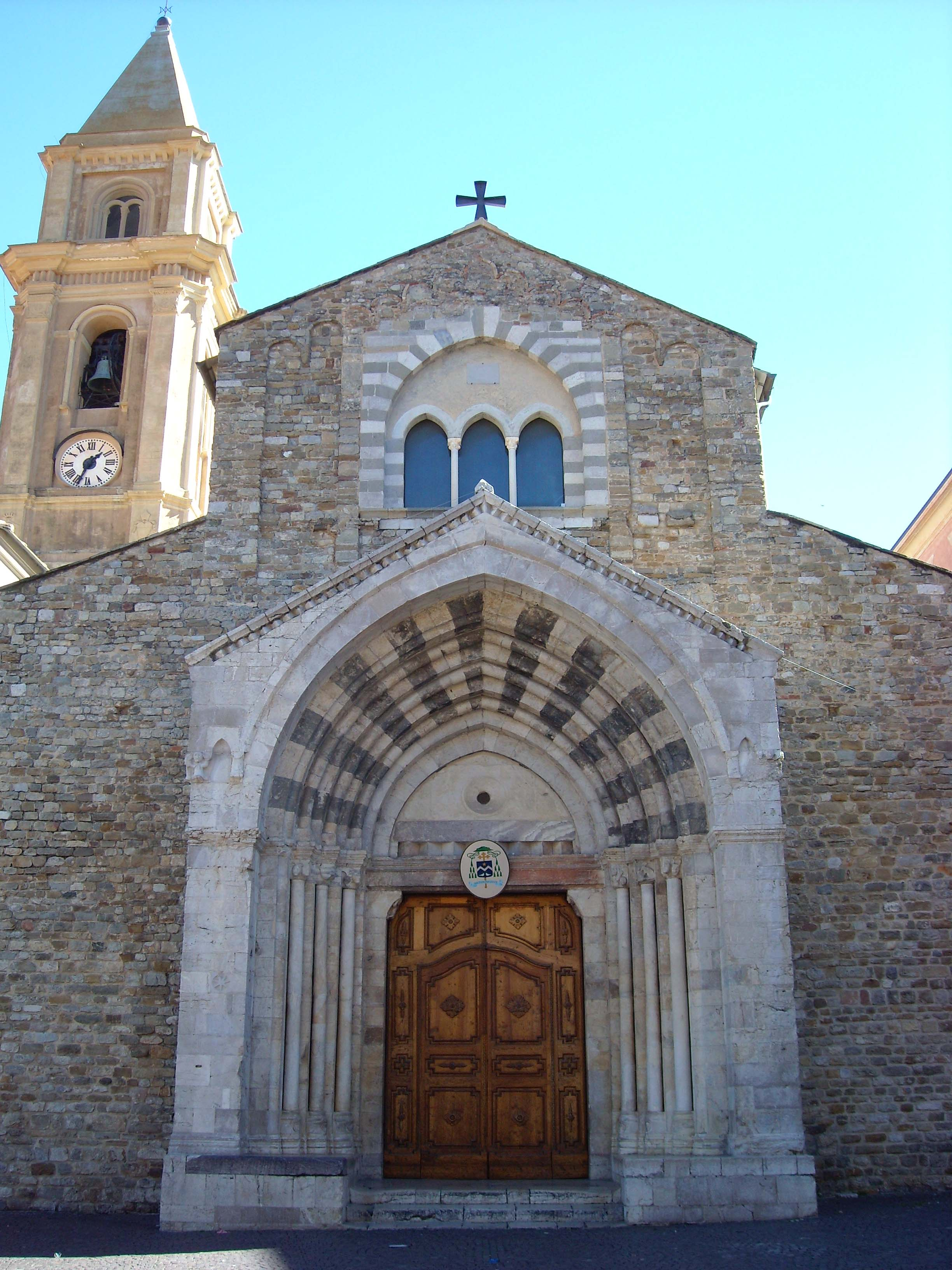 Il portale aggiunto alla facciata della cattedrale di Ventimiglia nel XIII secolo.